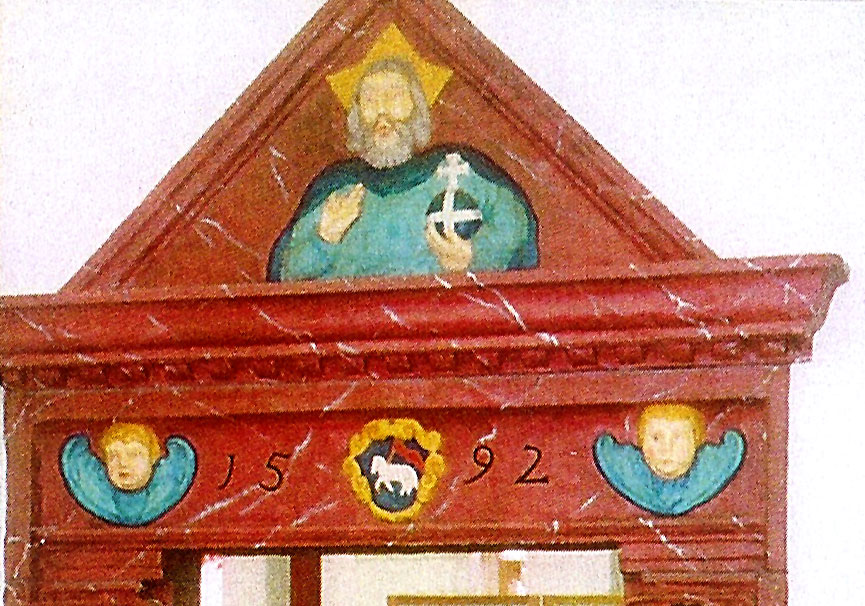 Der Giebel der Sandsteintürfassung von 1592 im Kühneschen Haus.